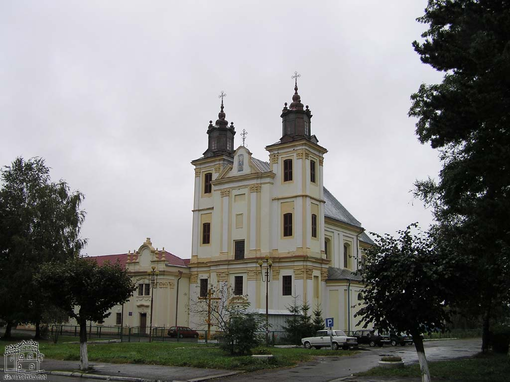 Домініканський_Монастир_у_Богородчанах.jpg: Домініканський Монастир у смт Богородчанах Івано-Франківської області (вересень 2005 року)